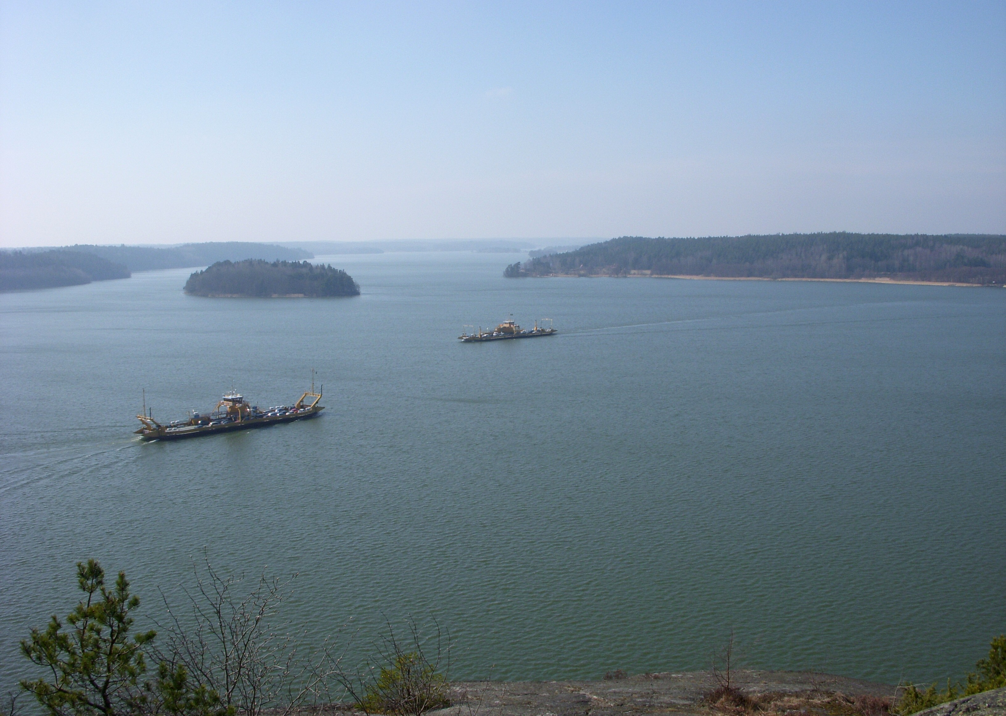 Mälaren från Korpberget vid Slagsta, Ekeröfärjorna möts på fjärden